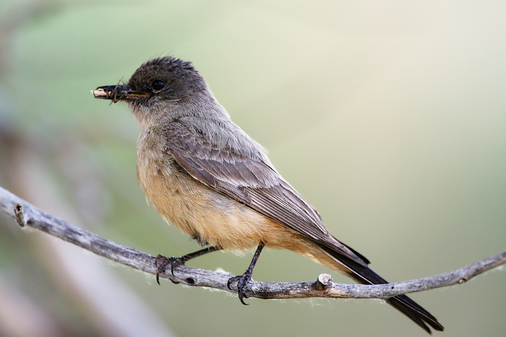 Say's Phoebe / Sayornis saya